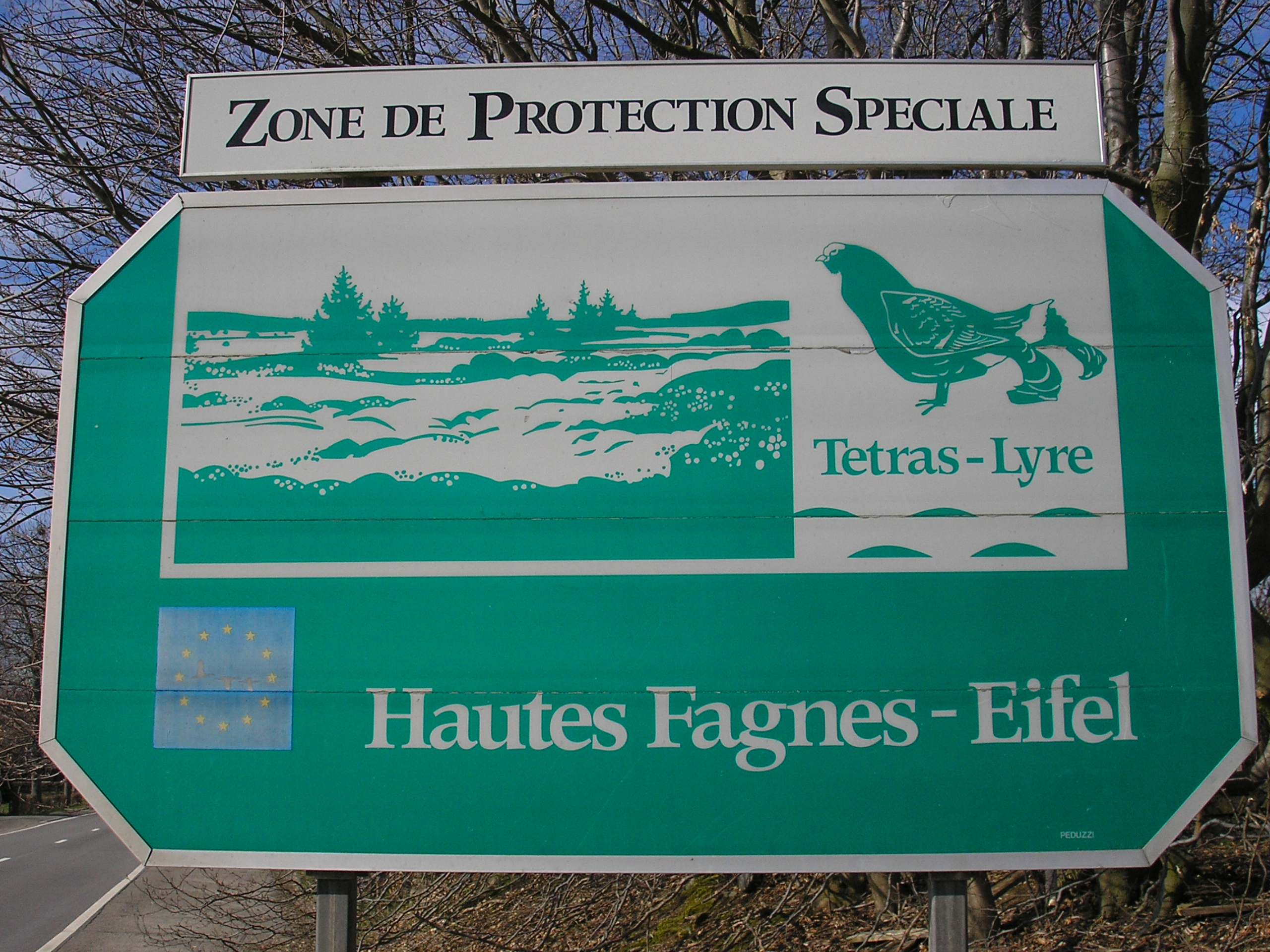 Verkehrsschild Hohes Venn, Hautes Fagnes, Weismes, East Belgium